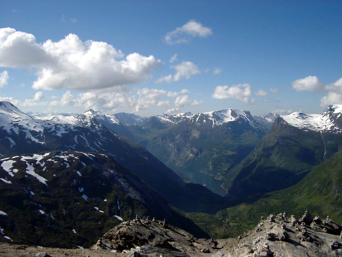 Dalsnibba; Blick auf Geiranger 2 Norwegen